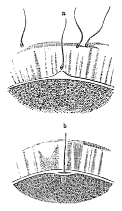 Abschnitte des Eies eines Seesterns (Asterias glacialis) a – Samenfaden in die Hüllzone des Eies eindringend b – Samenfaden hindurchgedrungen